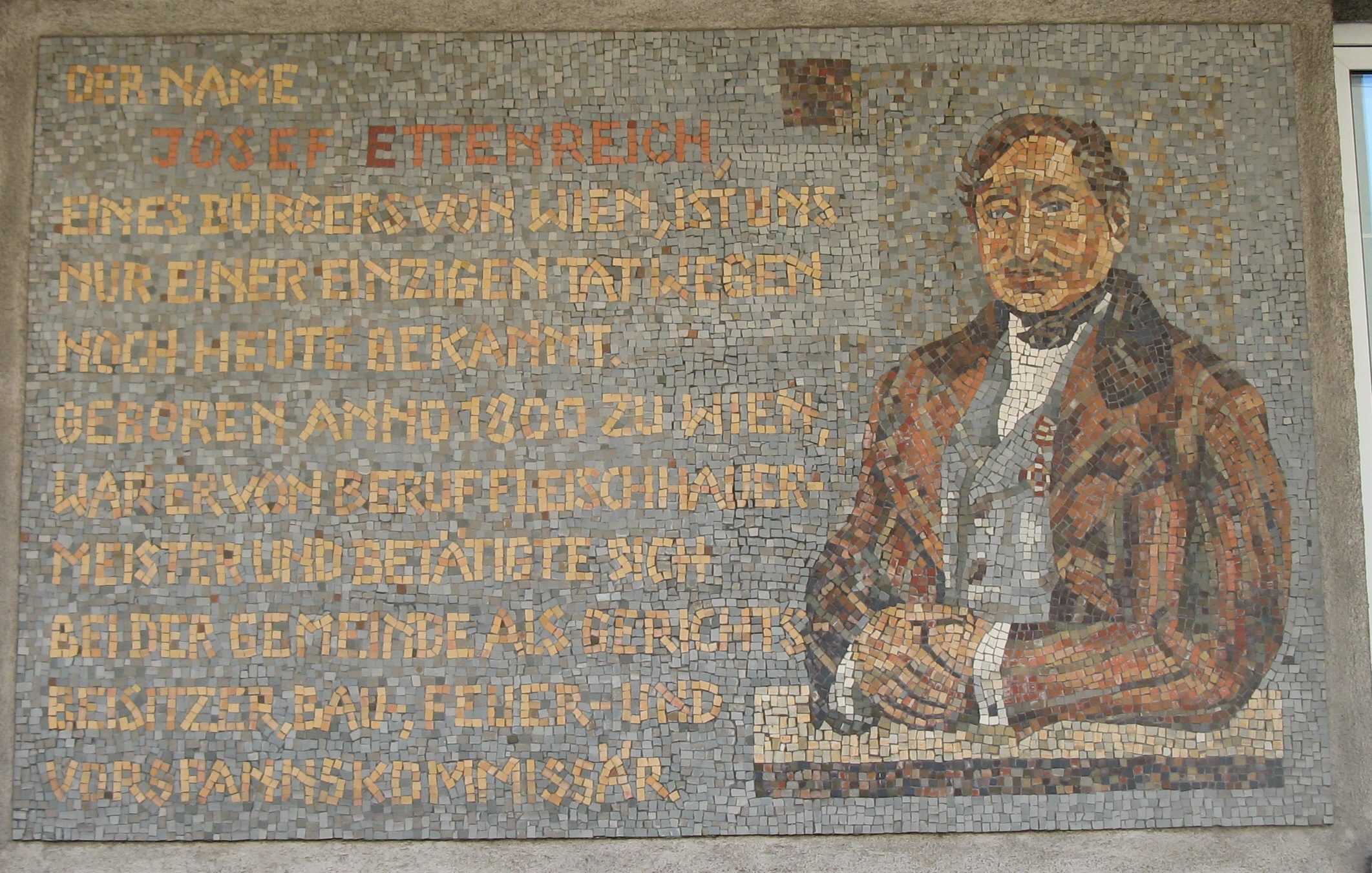 Mosaik für Josef Ettenreich - linke Seite, Ettenreichgasse 22, Wien-Favoriten